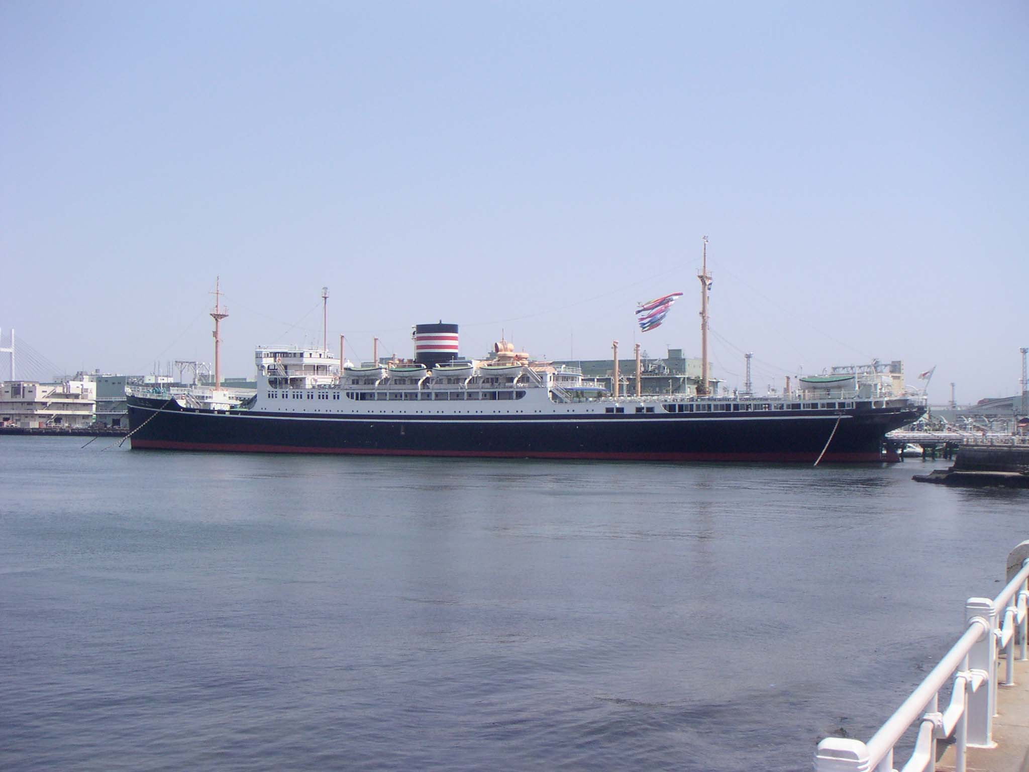 横浜 氷川丸 Hikawamaru